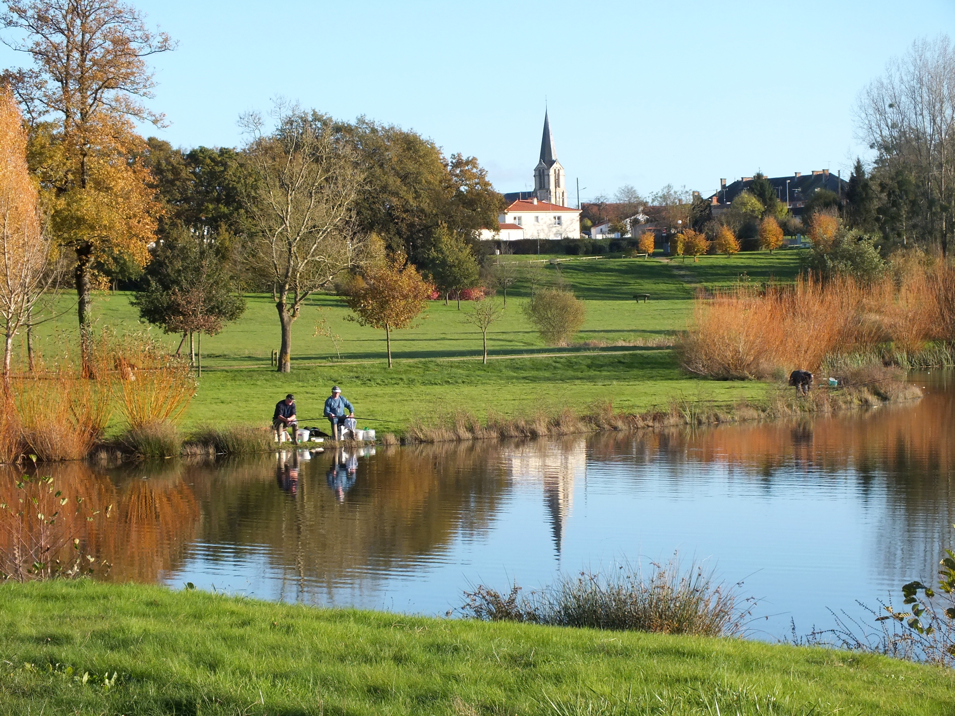 Martinet - Le parc des Ouches et l'église